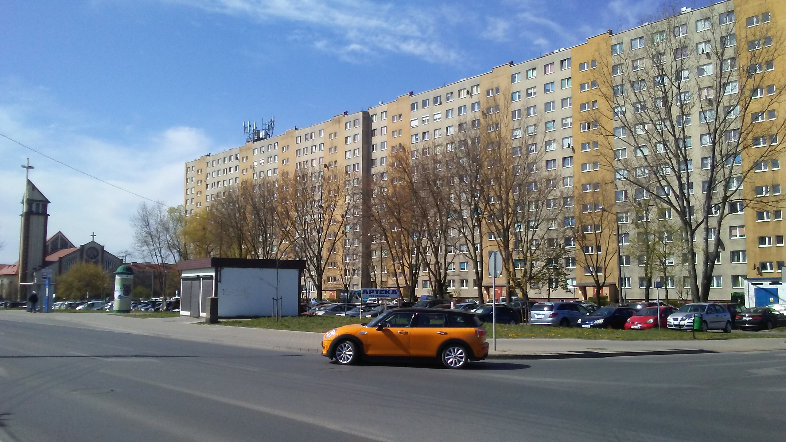 Blok mieszkalny przy ulicy Dzieci Polskich 1, Niebrów, Tomaszów Mazowiecki